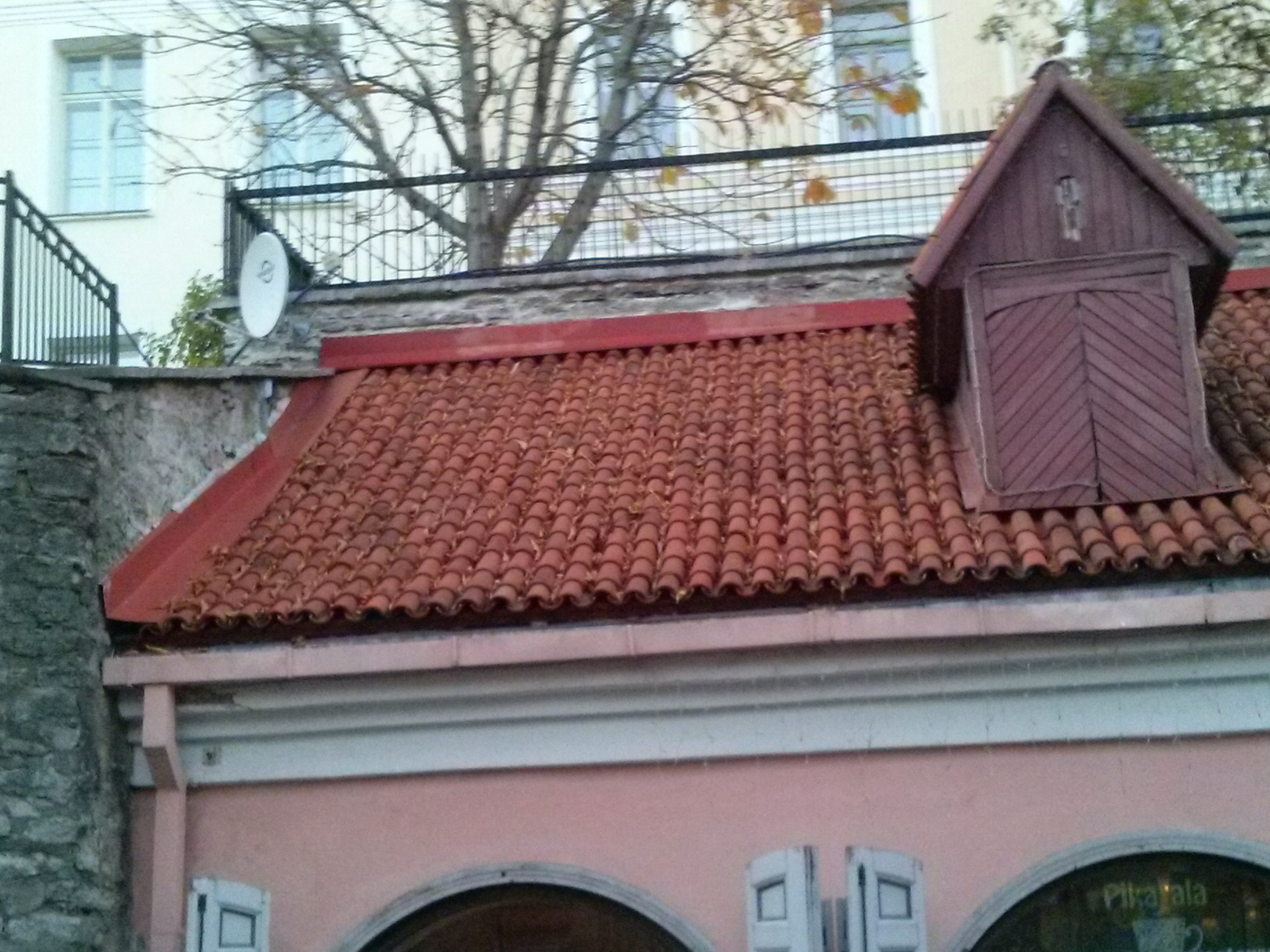 Munk-nunn katusekate Tallinnas